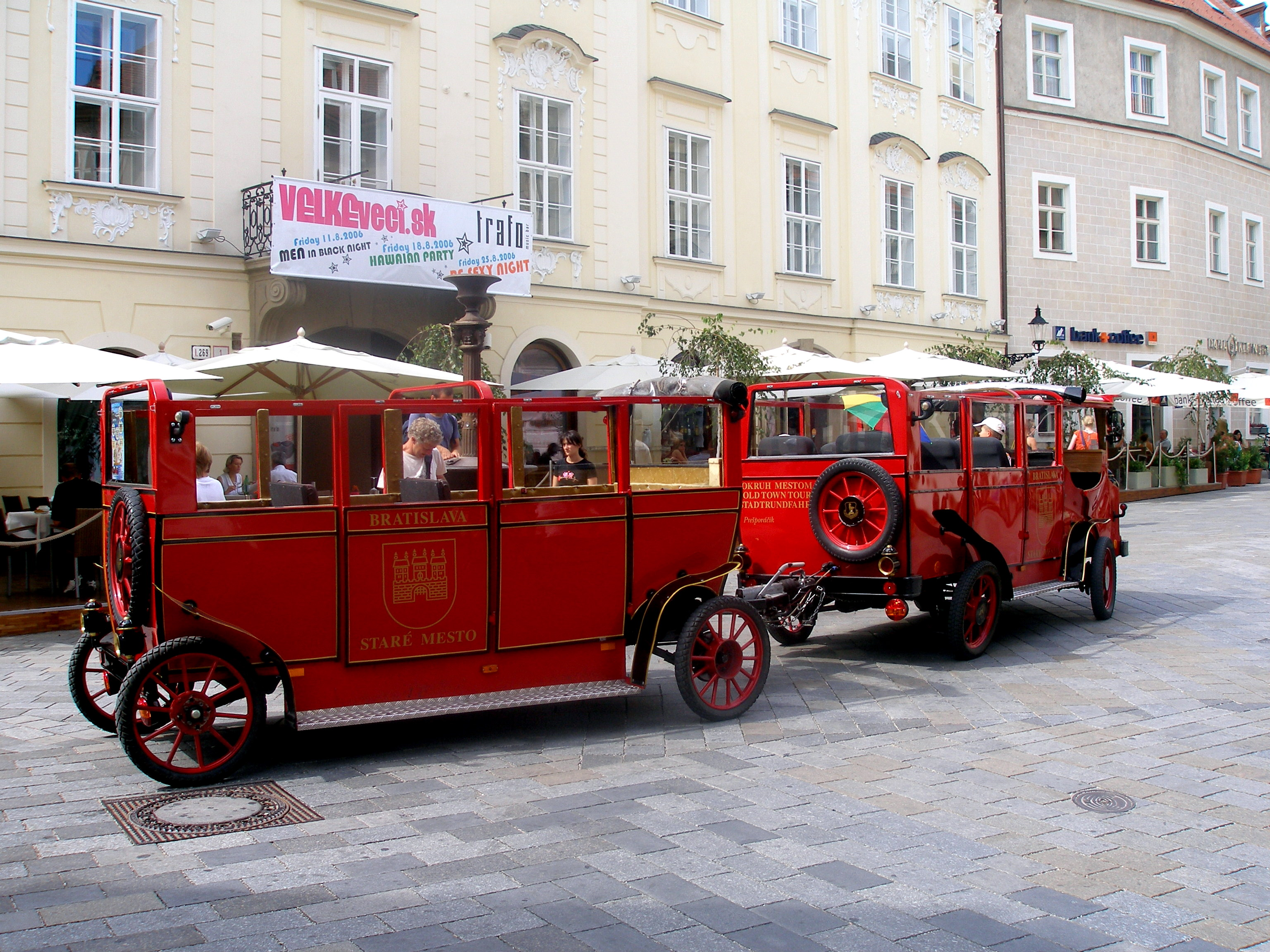 Hlavné mesto Slovenskej republiky - Bratislava, časť Staré mesto